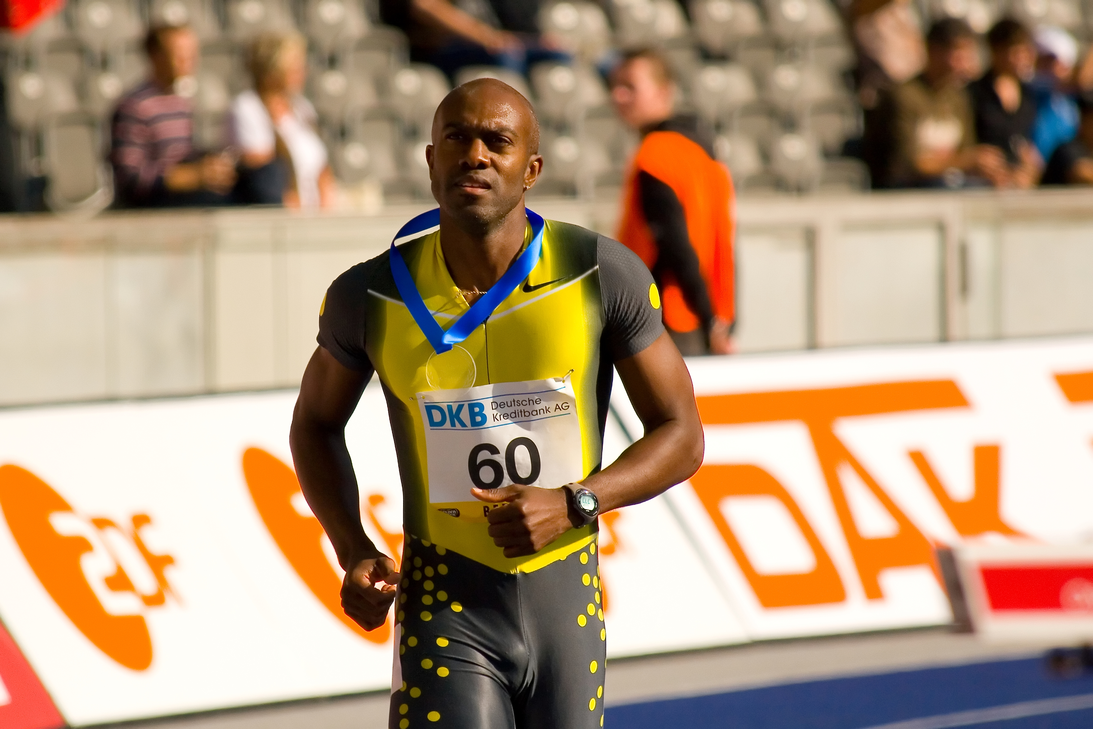 Allen Johnson Istaf Berlin